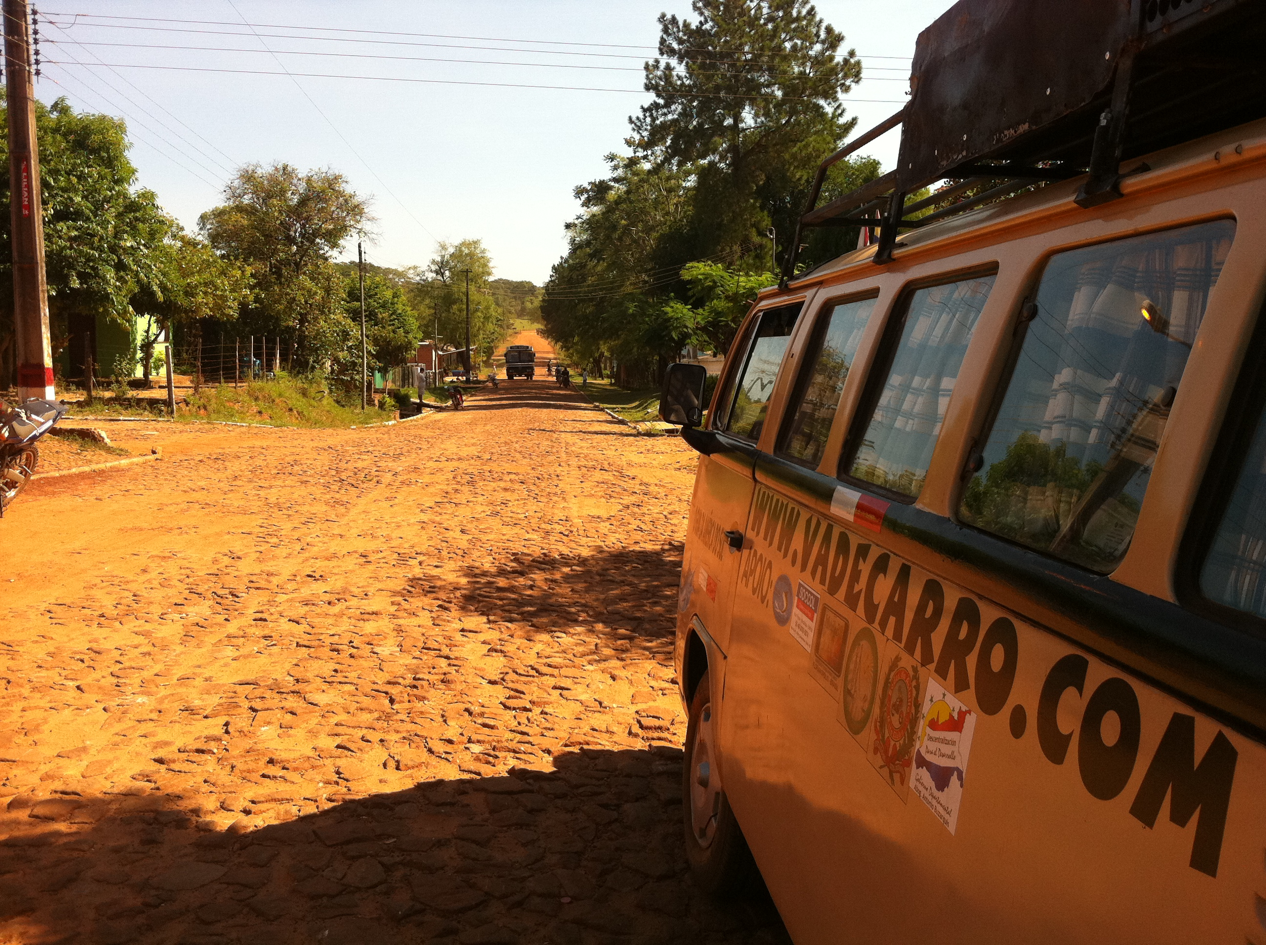 Esta es la Calle principal del distrito La Pastora Departamento Caaguazú Paraguay.